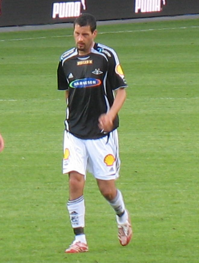 Fotballspilleren Alejandro Lago